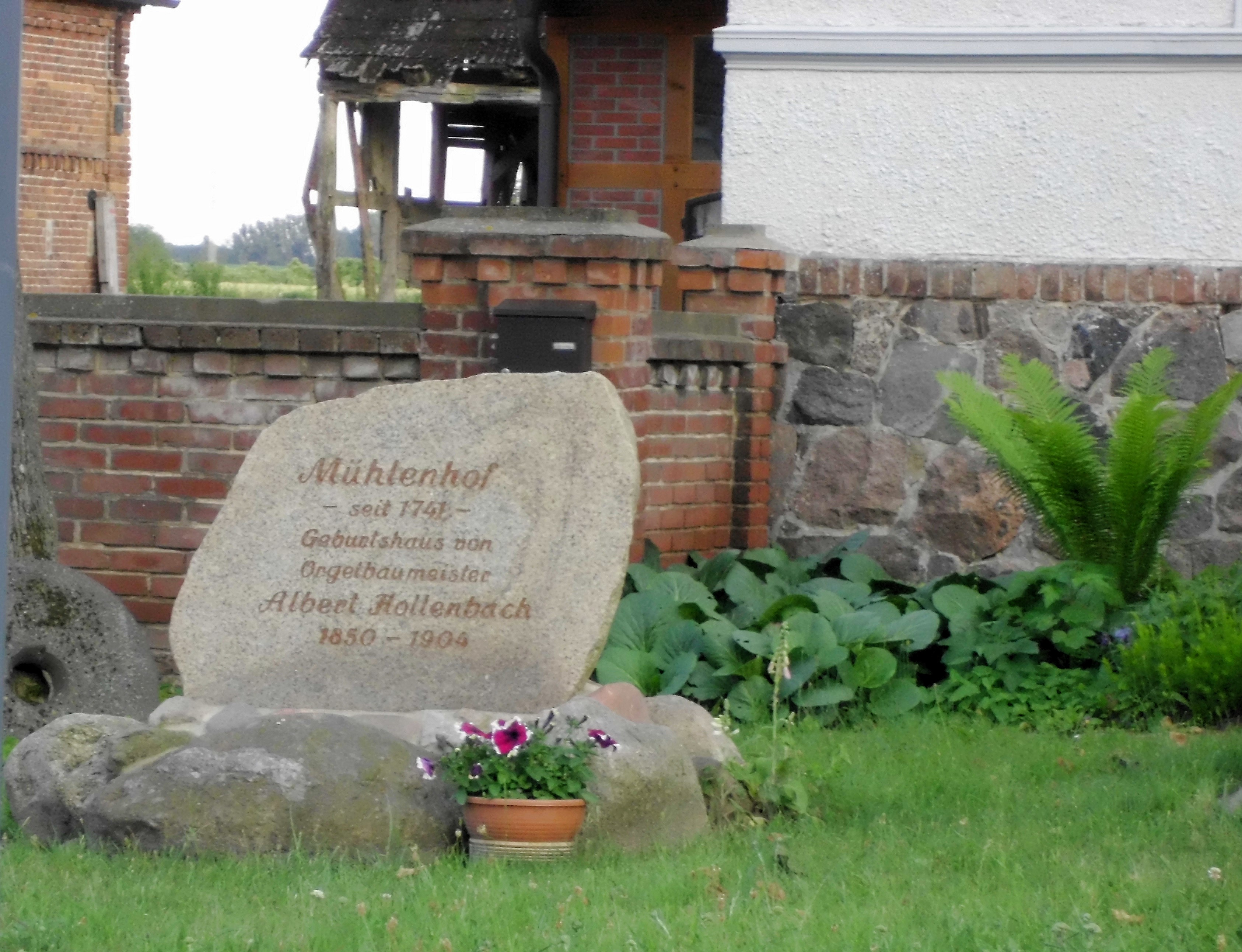 Gedenkstein an der Mühle in Blankenberg, Wusterhausen/Dosse, Landkreis Ruppin, Geburtshaus des Orgelbauers Albert Hollenbach